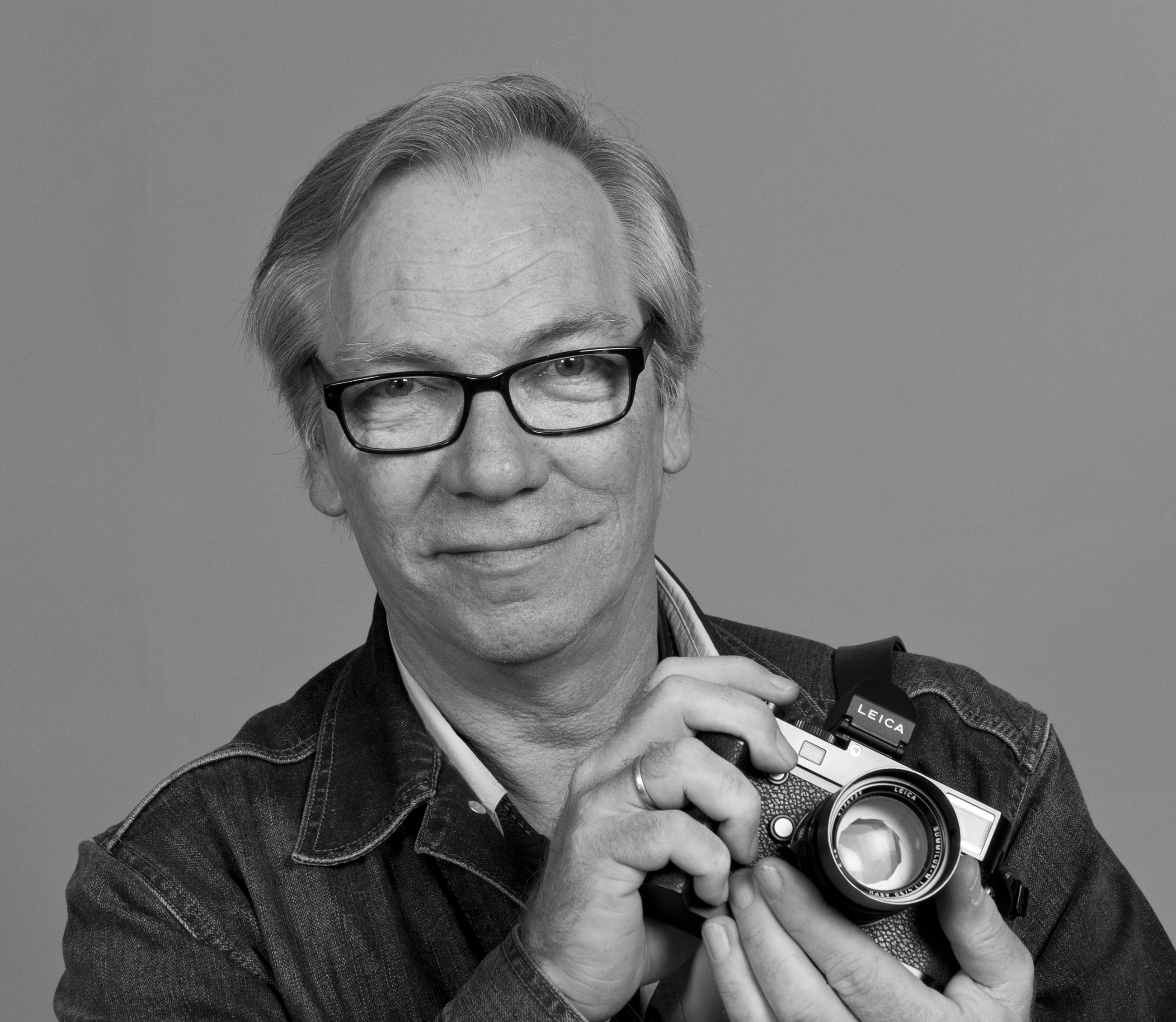 Herbert Piel (* 9. März 1957 in Neuss) ist ein deutscher Fotograf und Fotojournalist. Landtag Rheinland-Pfalz 2014 19. bis 20. Februar 2014 in MainzDieses Foto wurde im Rahmen des Projektes „WIKI loves parliaments/Landtag Rheinland-Pfalz“ erstellt. Fragen zur Nachnutzung Wenn Sie Fragen zur Nachnutzung dieses Bildes haben, können Sie sich jederzeit gern an wenden